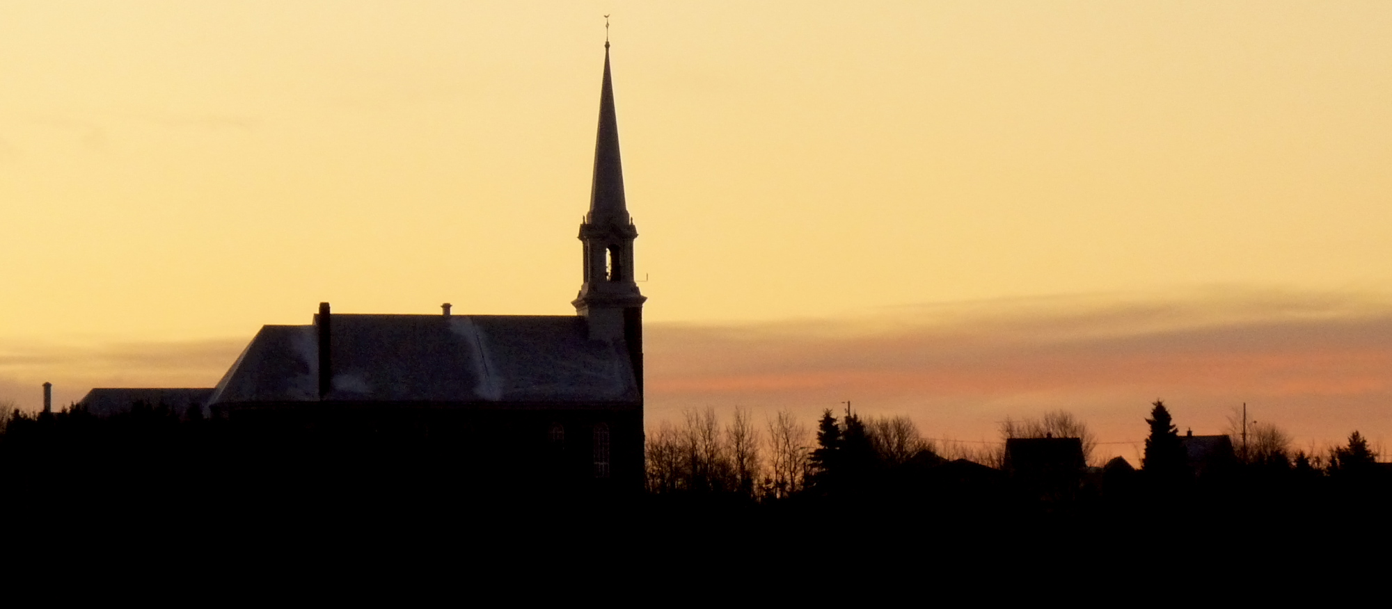 Village de Saint-Paul-de-la-Croix au Québec (canada) à l'aube